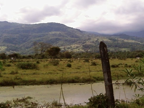 Paysage de la municipalité d'Acacias en Colombie, département de Meta